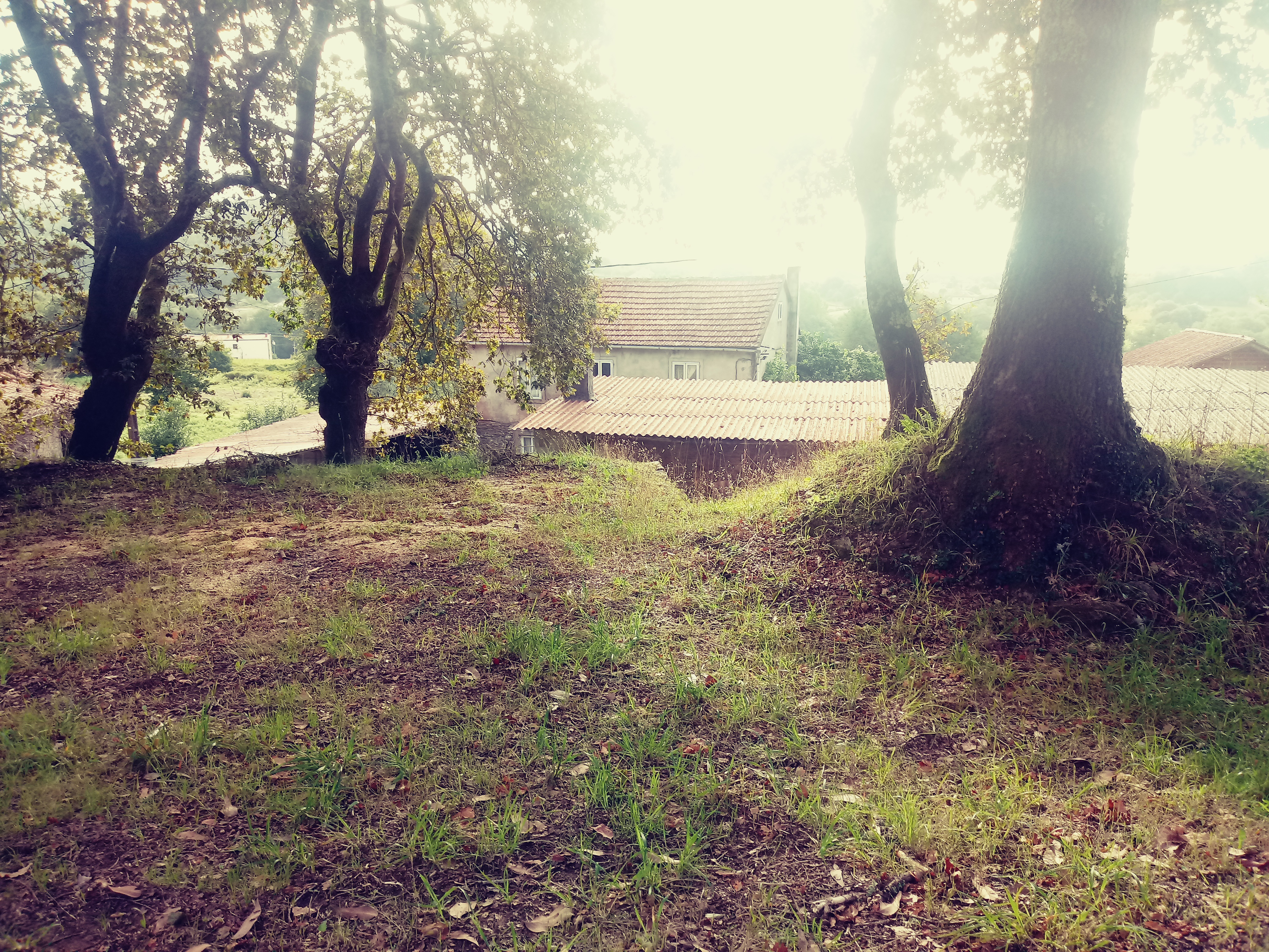 Casarío do lugar de Cimadevila, na parroquia de Pereira